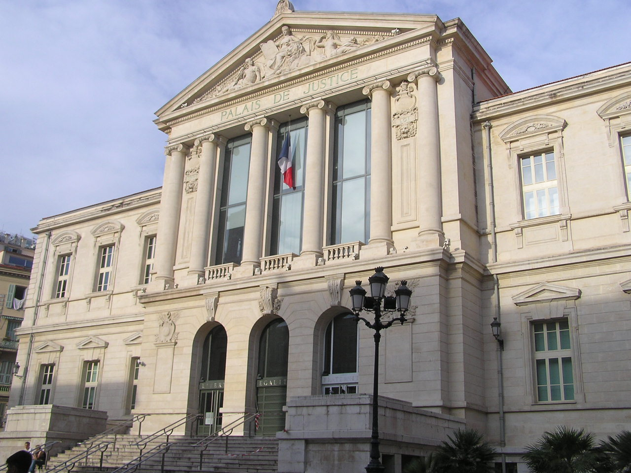 Palata pravde u Nici